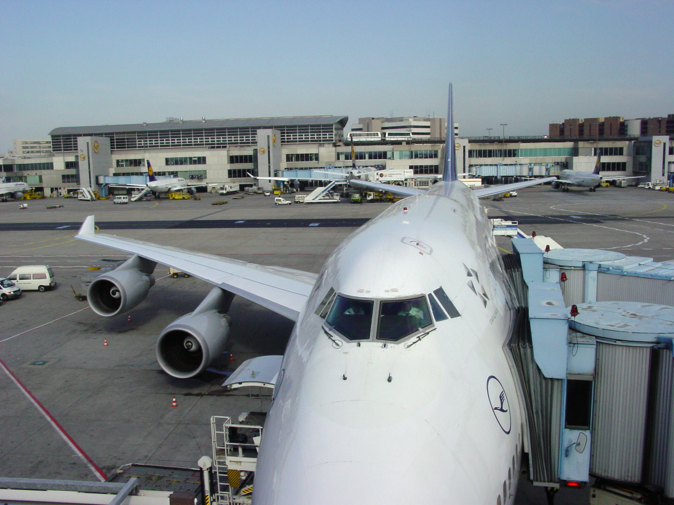 Lufthansa Boeing 747-400 at Flughafen Rhein-Main Airport (FRA)